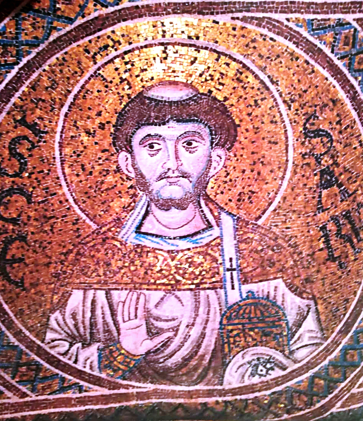 Raffigurazione musiva raffigurante "S. CESARIUS" (S. Cesario diacono e martire sotto Traiano), eseguita tra il XII e la metà del XIII secolo, Cattedrale di Monreale